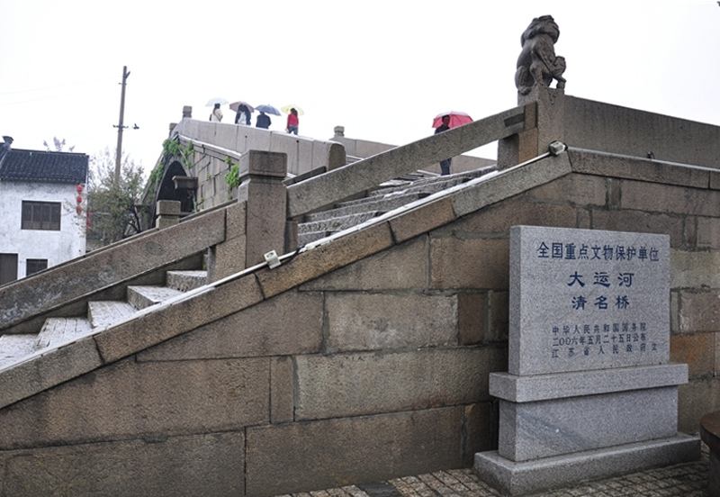 清名橋，無錫市南長街